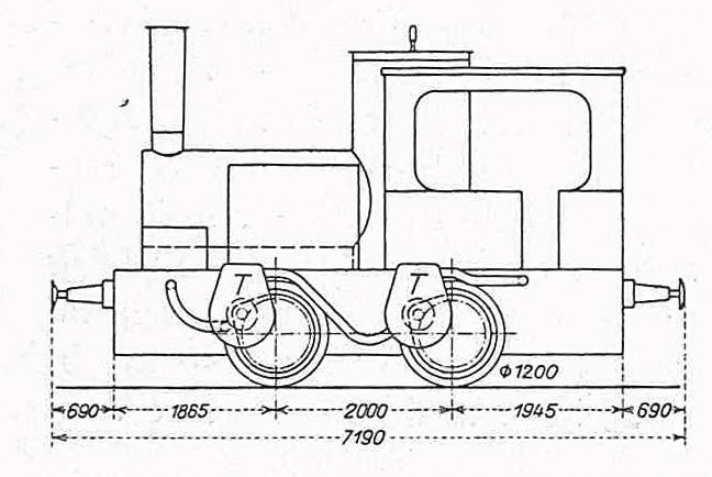 Turbinen-Dampflokomotive von Berrluzzo gebaut 1908 von den Officine meccaniche Miani-Silvestri-Grondona-Comi, Mailand (Aufriss)